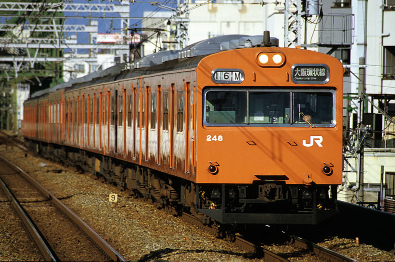 103系 大阪環状線 大正駅 2005年1月10日 投稿者撮影